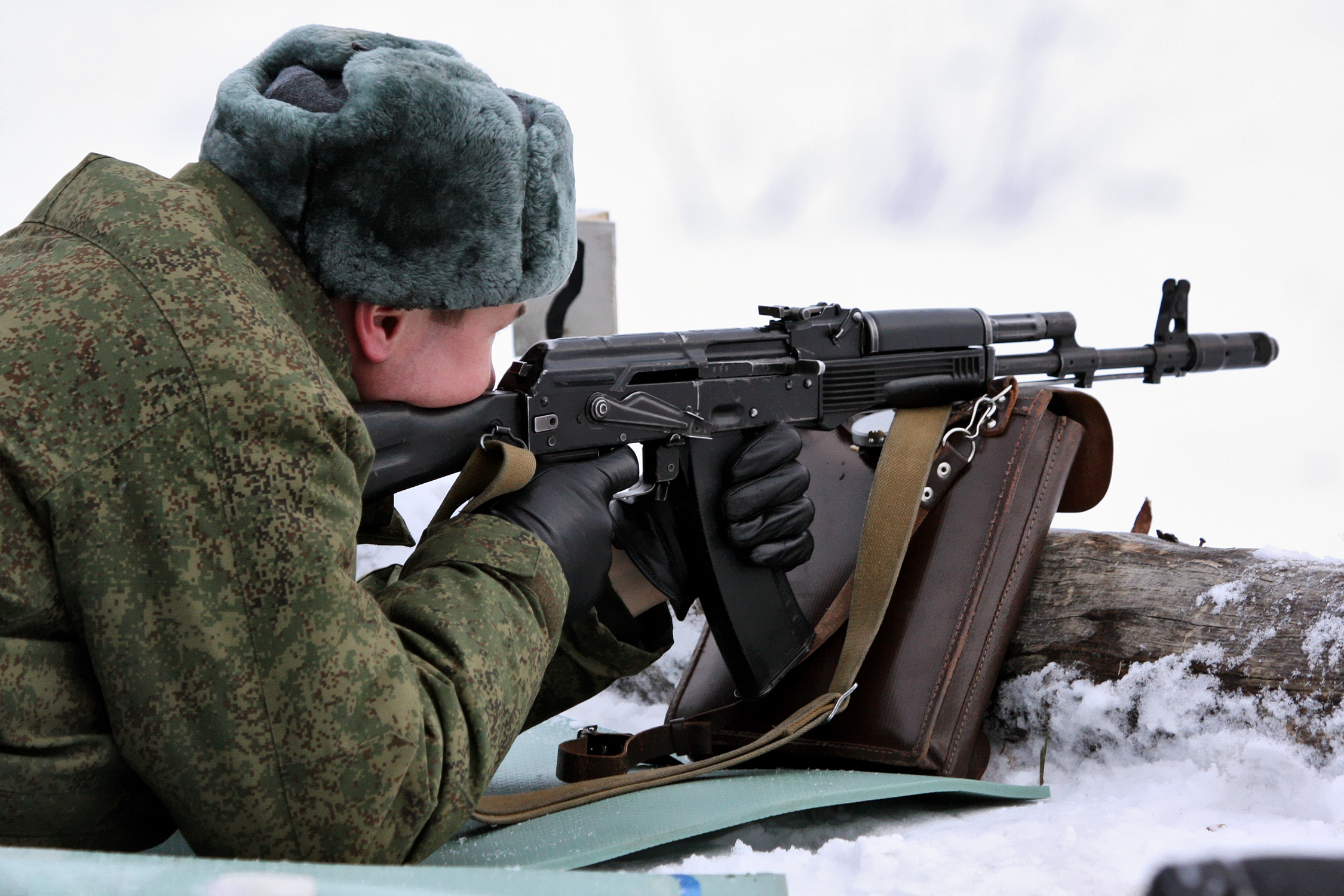 На стрелковом рубеже с АК-74М